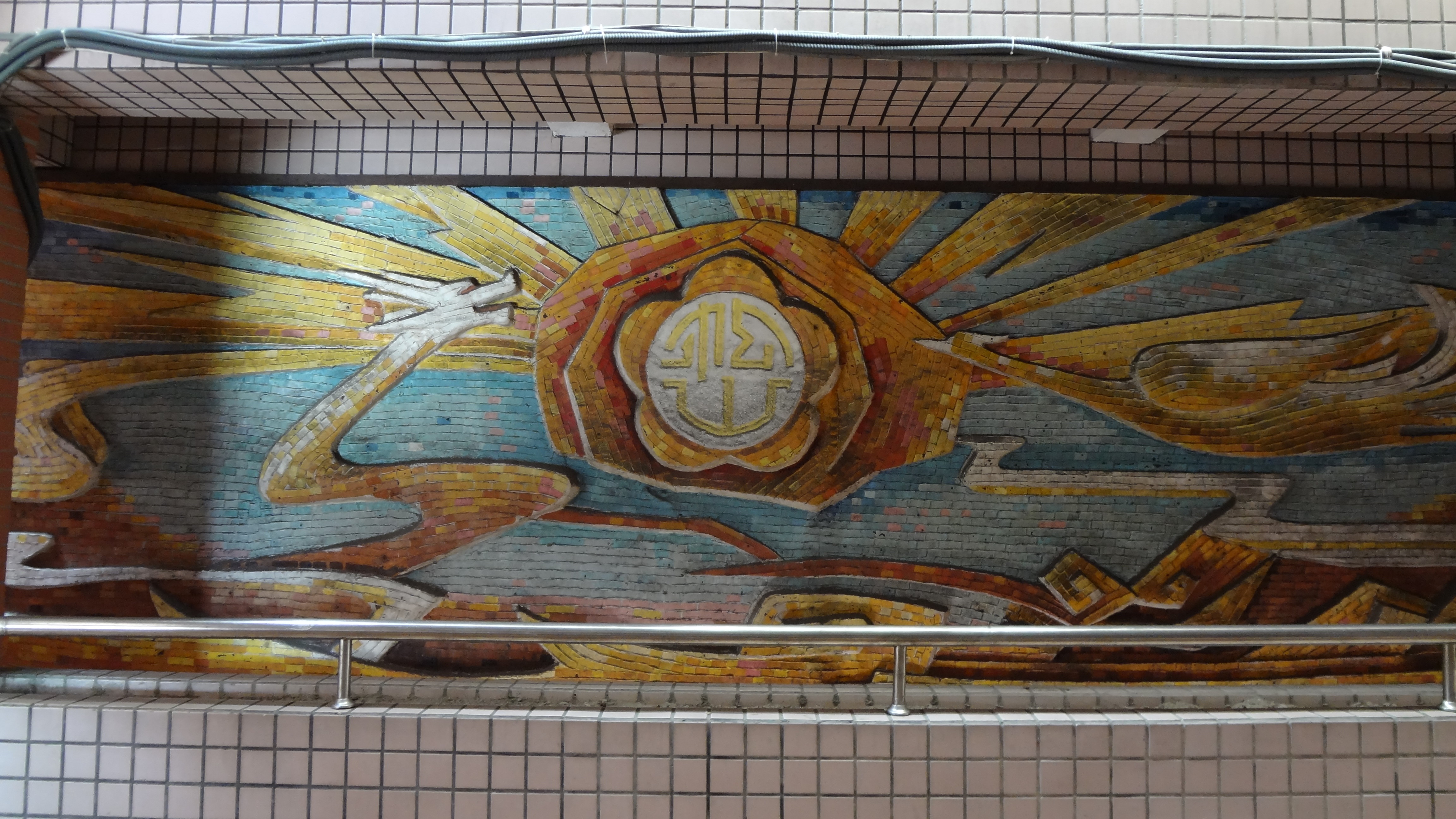 原臺北市立松山國民中學校徽壁畫浮雕，位於臺北市立松山高級中學川堂2樓走道。